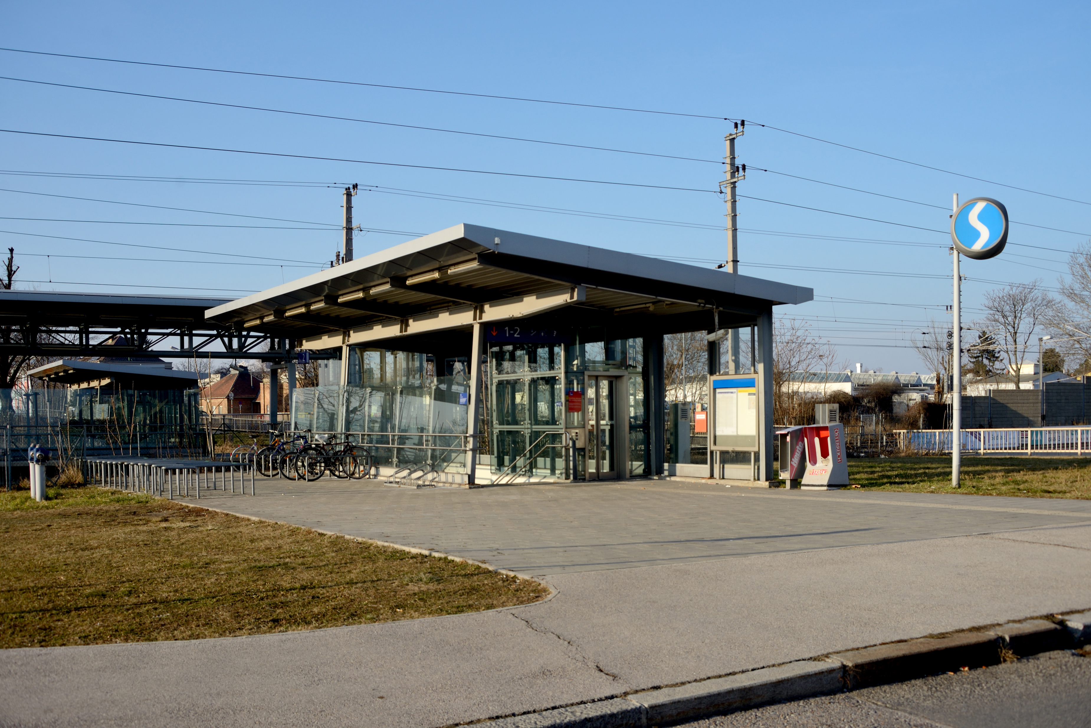 Zugang P+R der Haltestelle Kaiserebersdorf